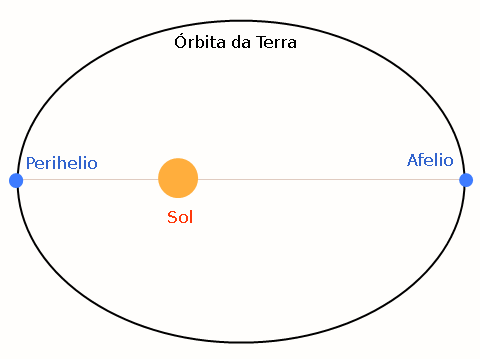 Esquema simplificado da rotación da Teerra arredor do Sol, mostrando os puntos de afelio e perihelio.